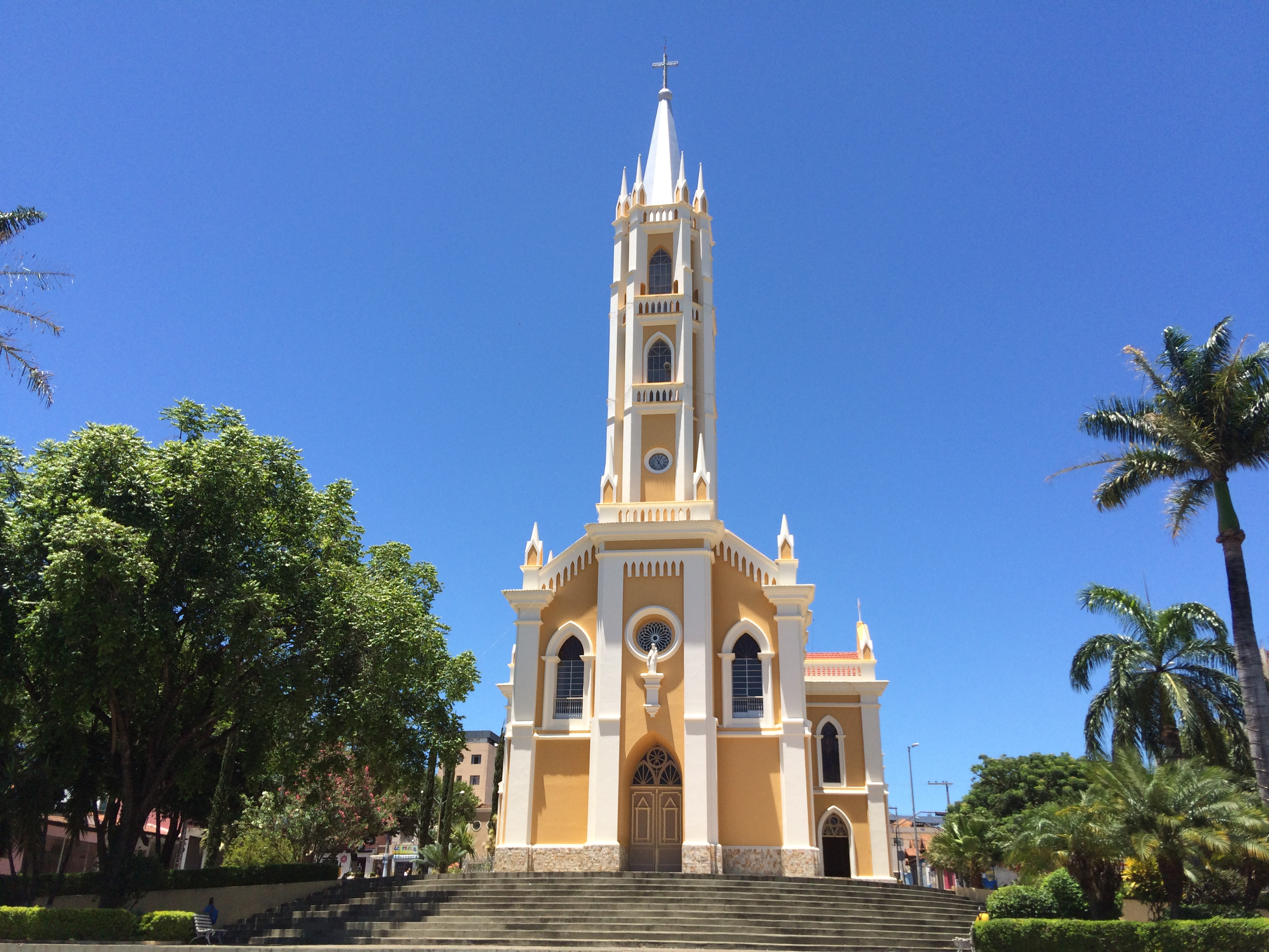 Igreja Nossa Senhora do Carmo - Carmo do Cajuru, MG